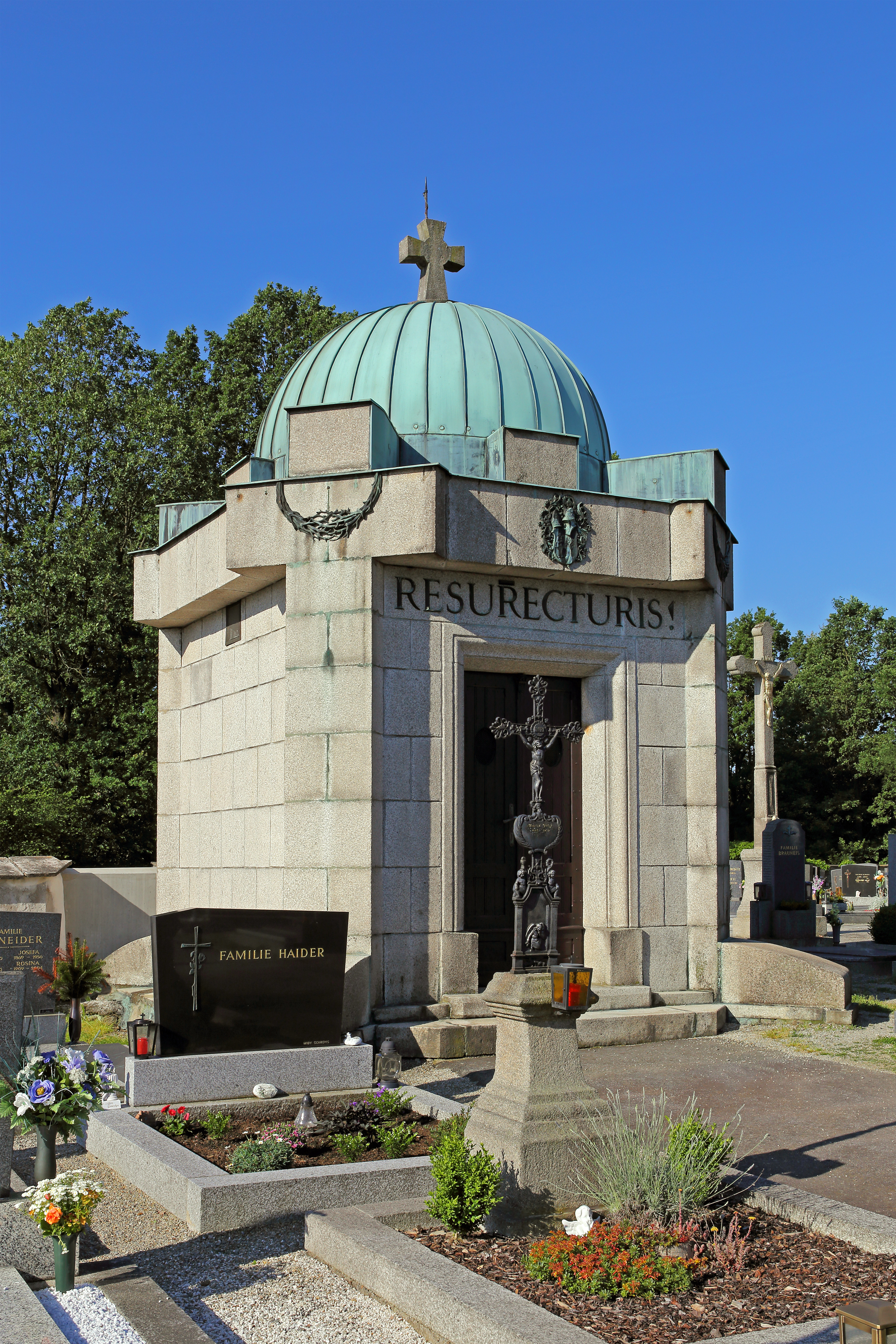 Das Mausoleum für Probst Ignaz Stidl wurde 1909 nach Plänen des Architekten Hans Prutscher erbaut.